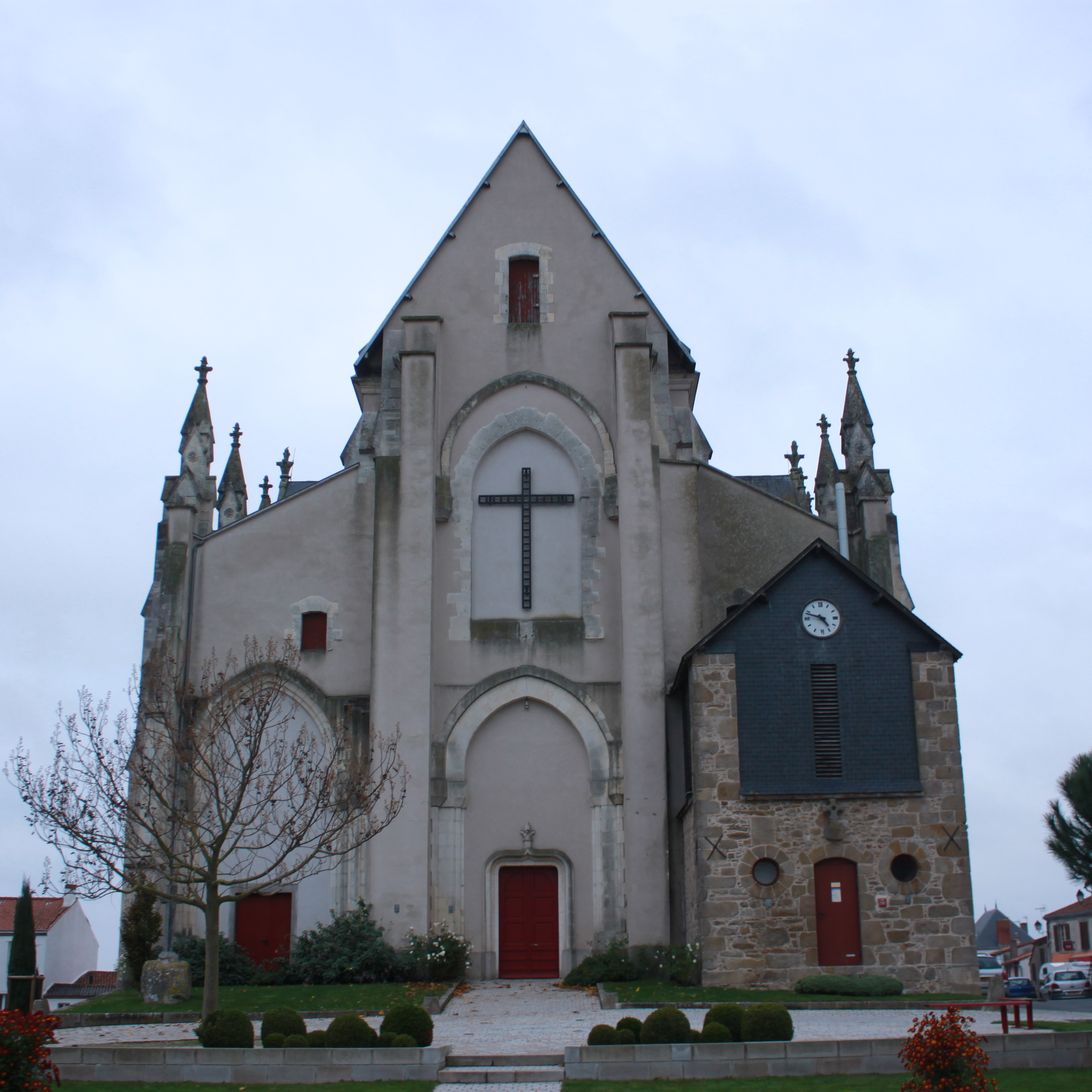 Église Sainte-Radegonde-Saint-Sébastien, 1872, Boussay.